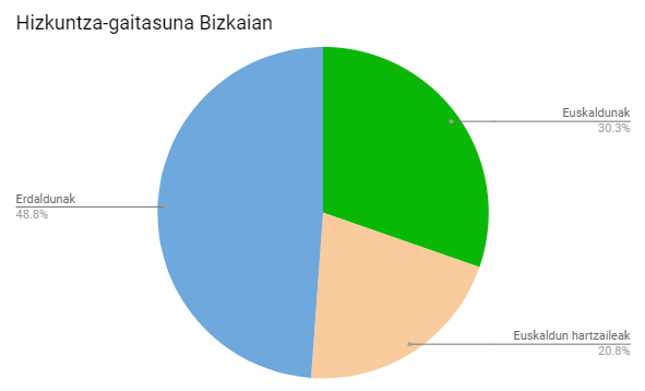 Bizkaiako hizkuntza-gaitasuna, 2011ko ikerketa soziolinguistikoaren arabera.